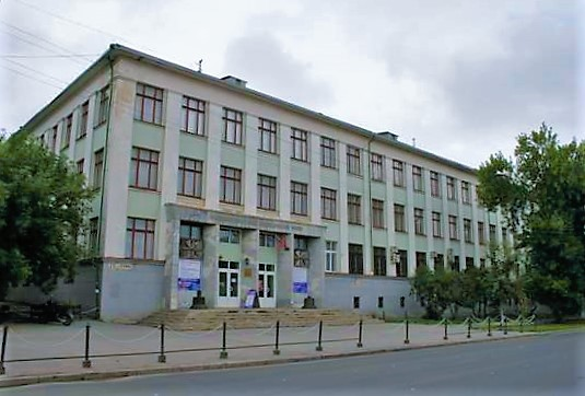 Липецкий областной краеведческий музей